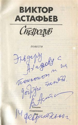 автограф великого писателя